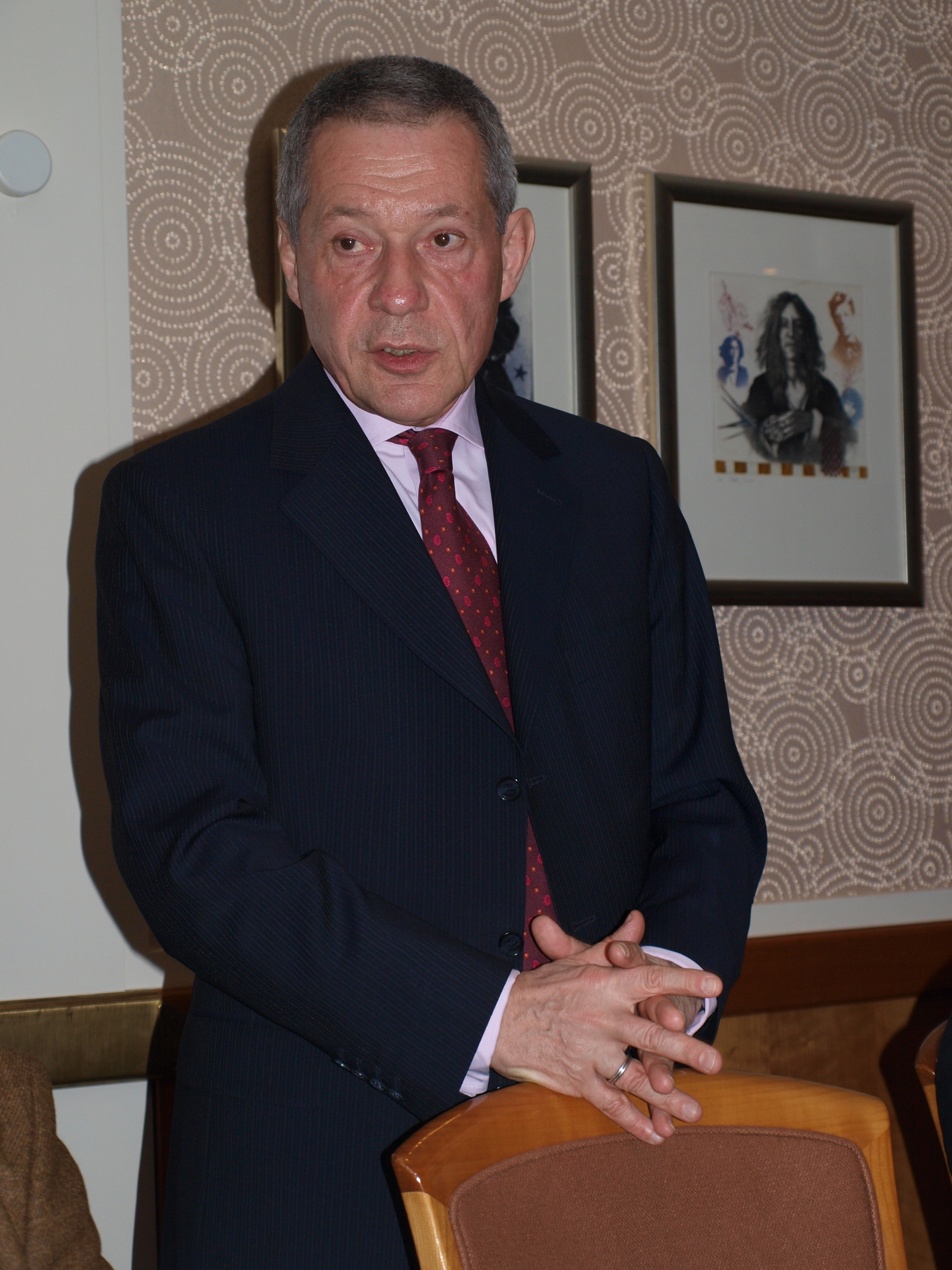 Harald Kindermann, Botschafter der Bundesrepublik Deutschland in Israel, am 10. Februar 2011 in Gießen